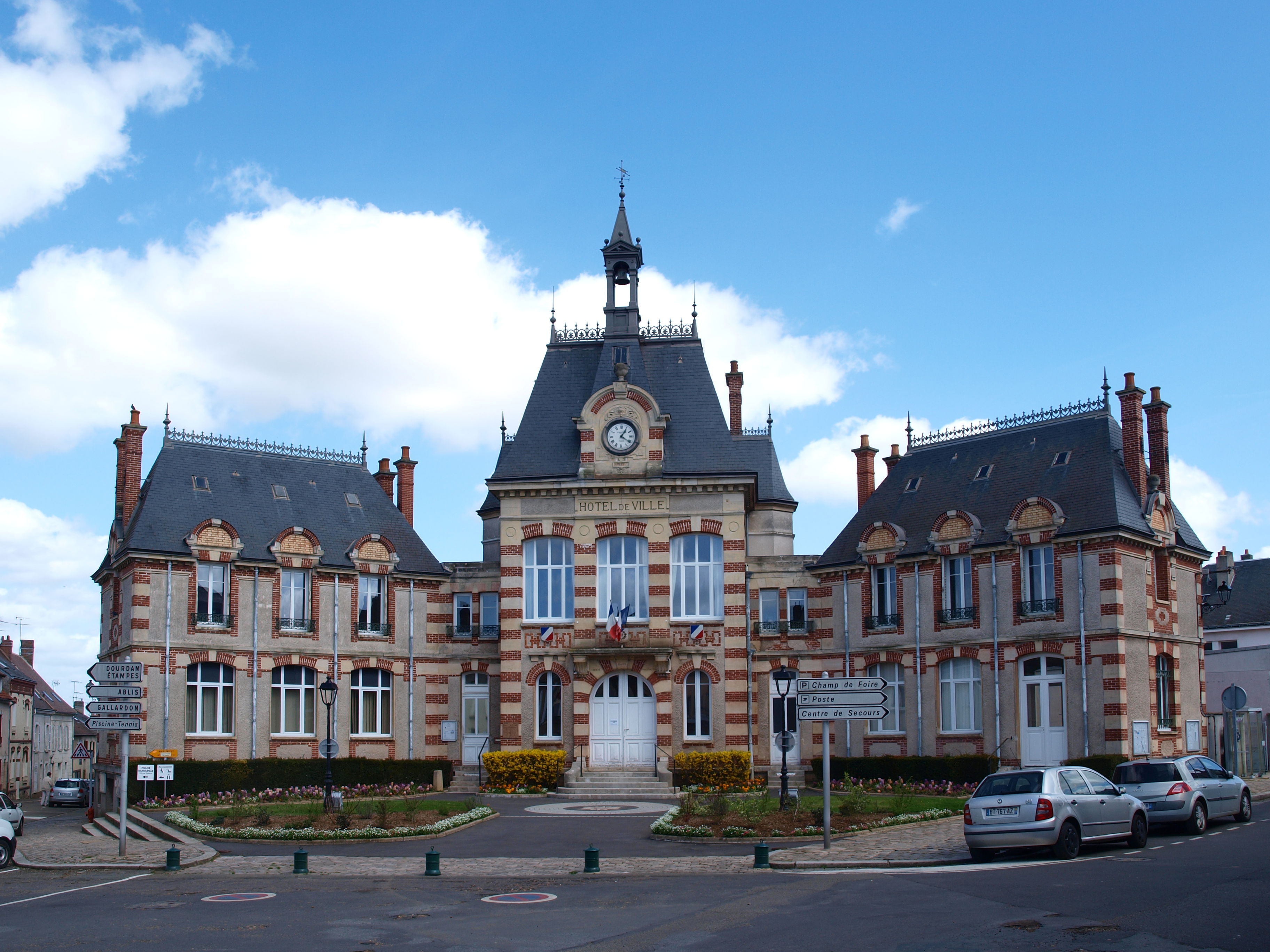 Auneau, Eure-et-Loir, France) ; l'hôtel de ville.